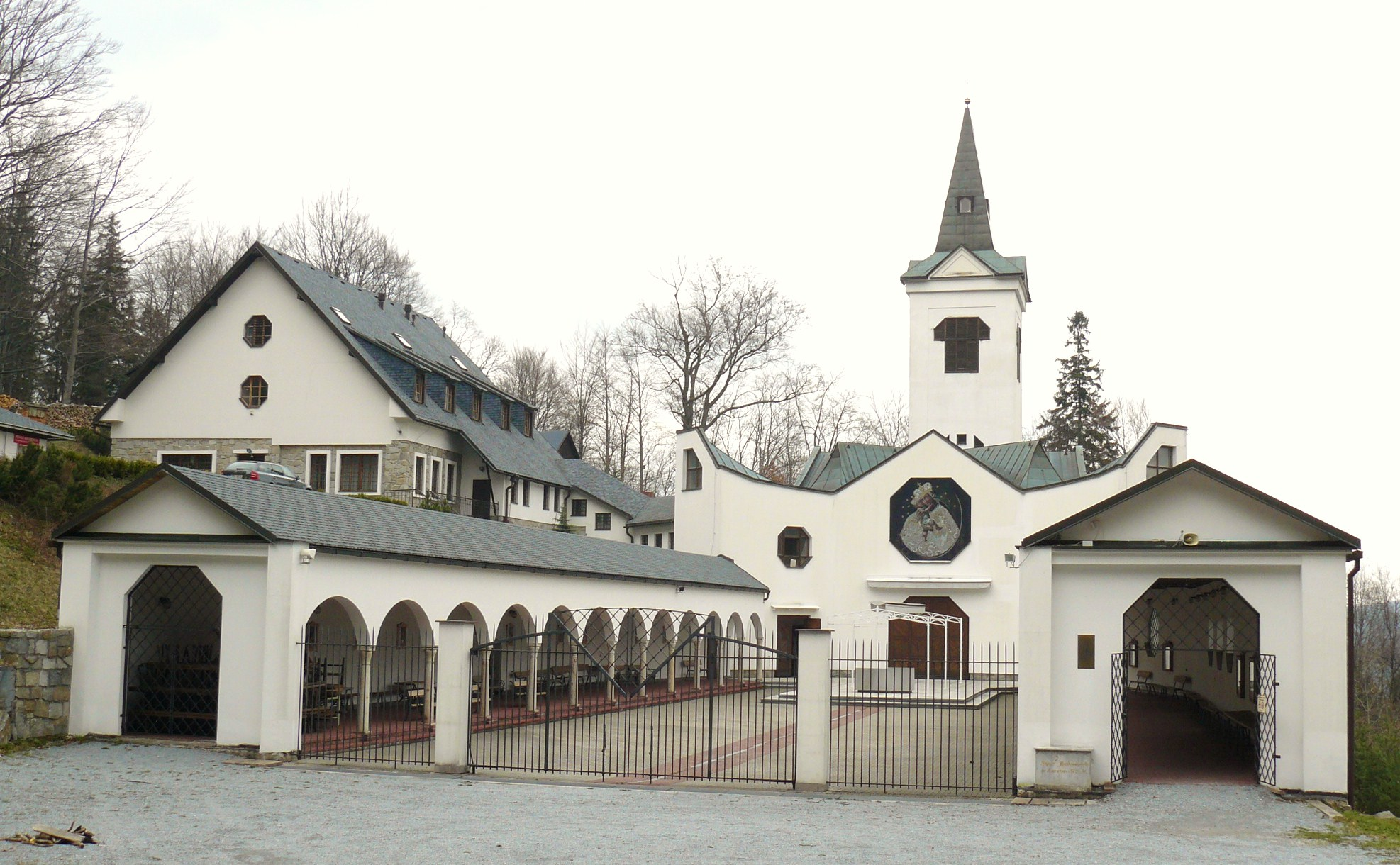 Kościół Maria Hilf nieopodal Zlatych Hor.